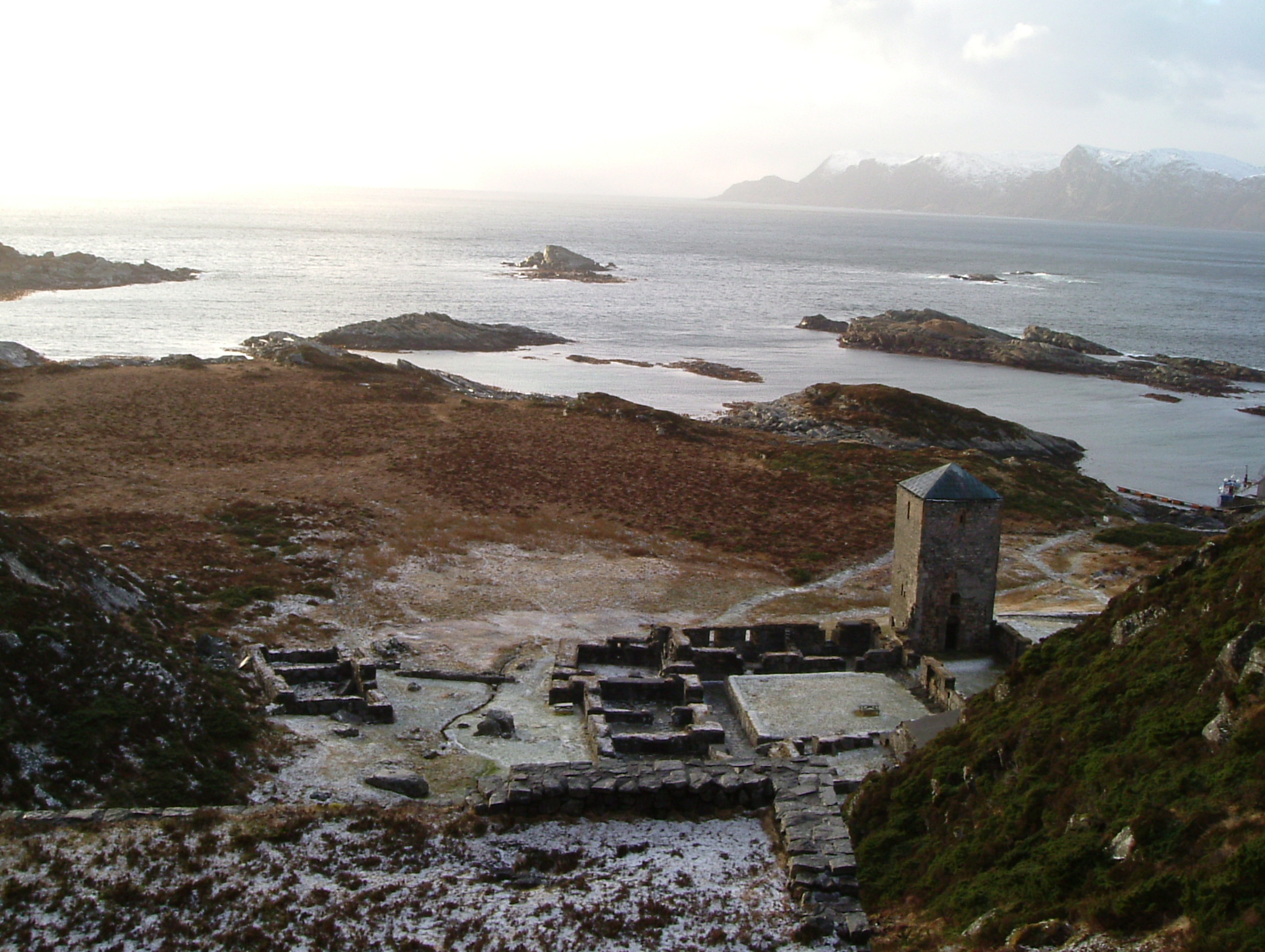 Ruinane på Selja